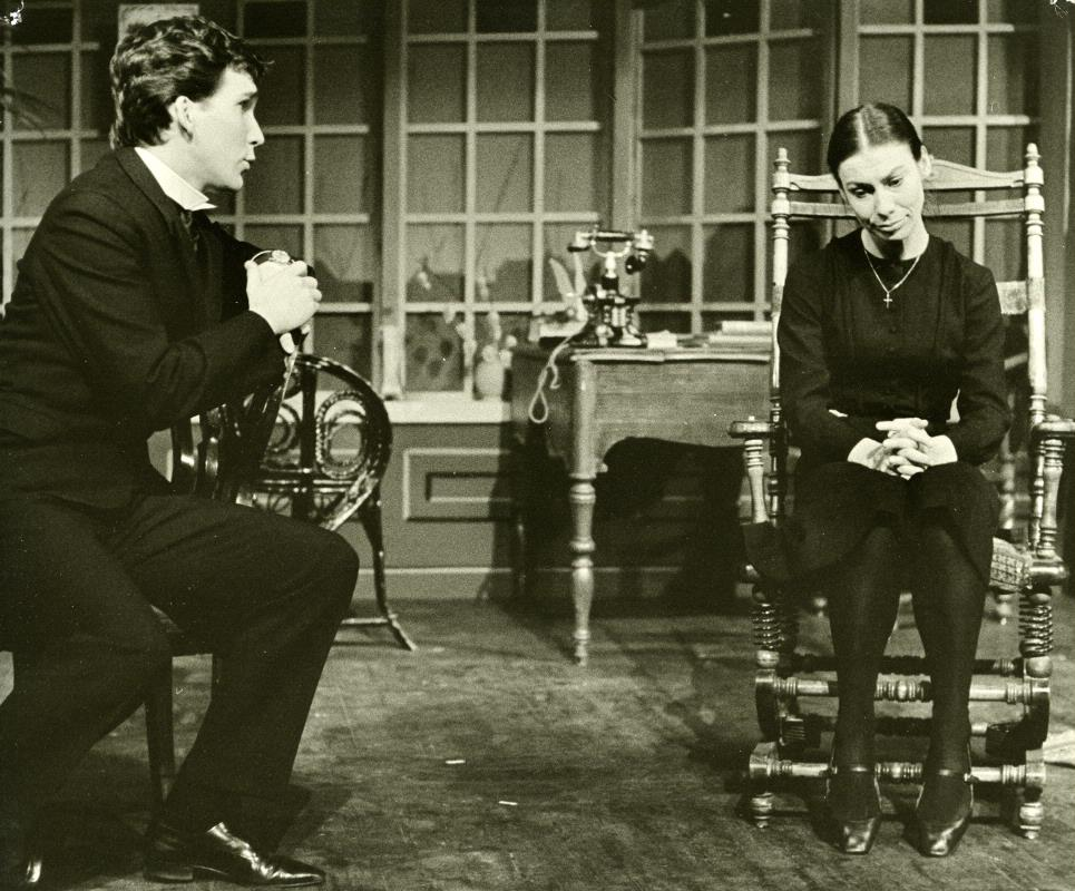 Christer Holmgren och Gurie Nordwalli Påsk på Helsingborgs stadsteater.